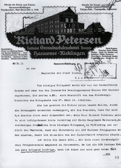 Briefbogen mit im Briefkopf expressionistisch dargestellter Ansicht der Betriebsgebäude der Firma Richard Petersen, hier als Schreiben aus der Zeit dem Ersten Weltkrieges vom 19. April 1917 an den Magistrat der seinerzeit noch selbständigen Industriestadt Linden ...